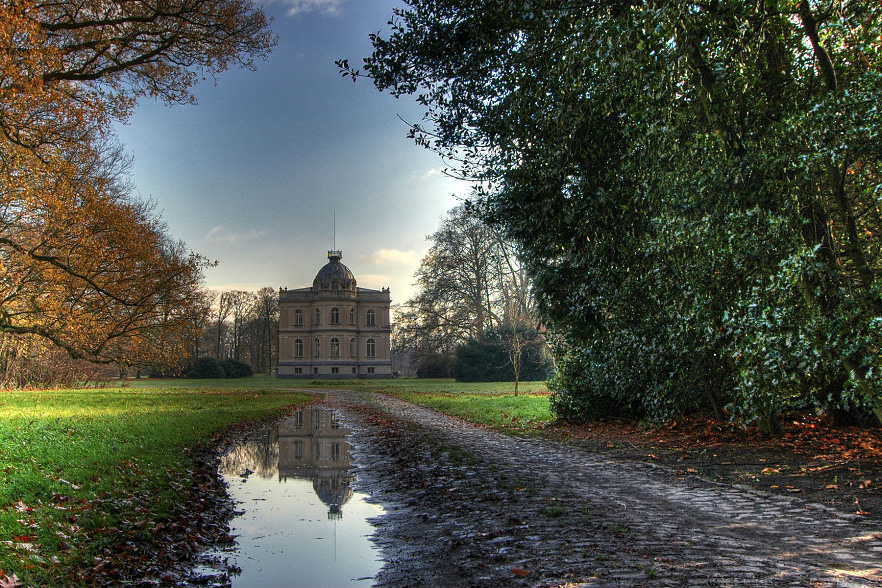 kasteel kesselhof te kessel